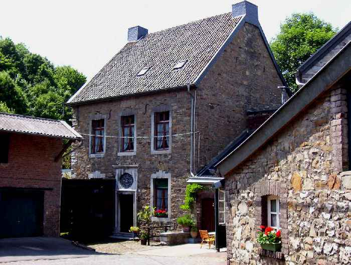 Kleinbernardshammer in Stolberg (Rhld.)